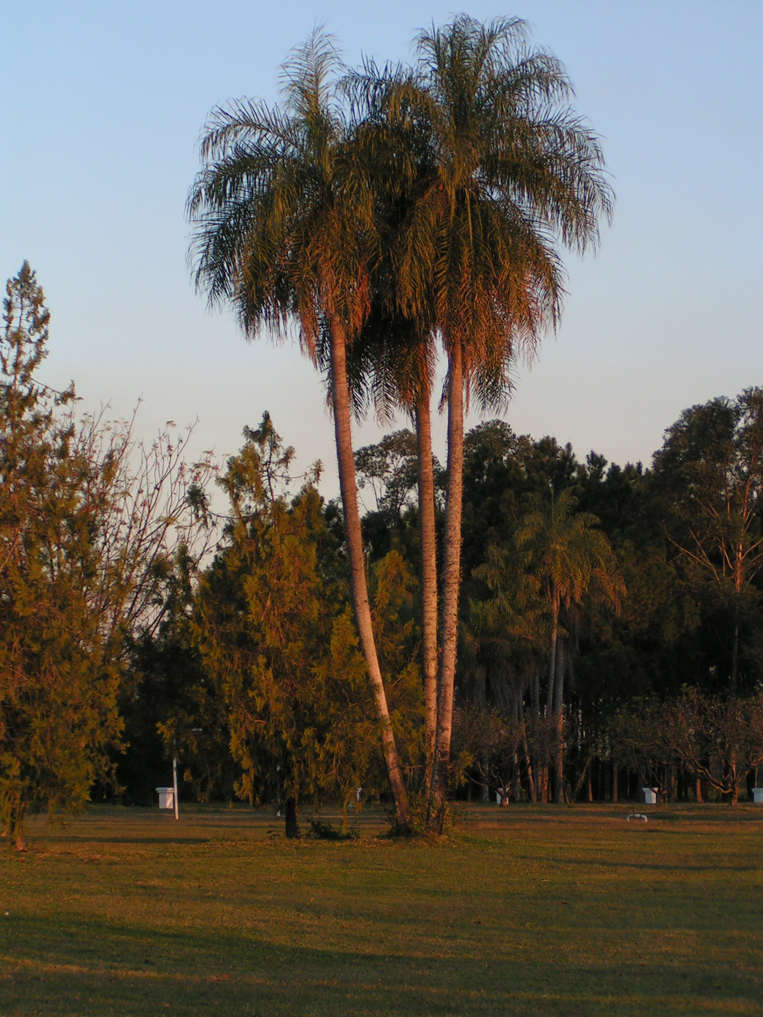 Mbokaja o mbocayá (Acrocomia aculeata, syn. A. totai), inusual en presentar un doble estípite (el tercero de la derecha, que parece de la misma planta, pertenece en realidad a otra arraigada muy cerca).